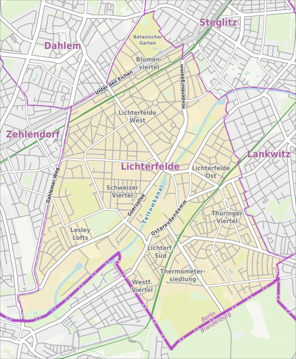 Übersichtskarte der Straßen und Ortslagen in Berlin-Lichterfelde